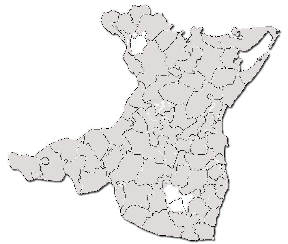 Categorie:Hărţi ale judeţului Constanţa